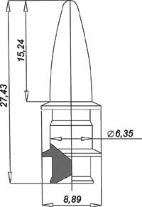 Пуля Герлиха